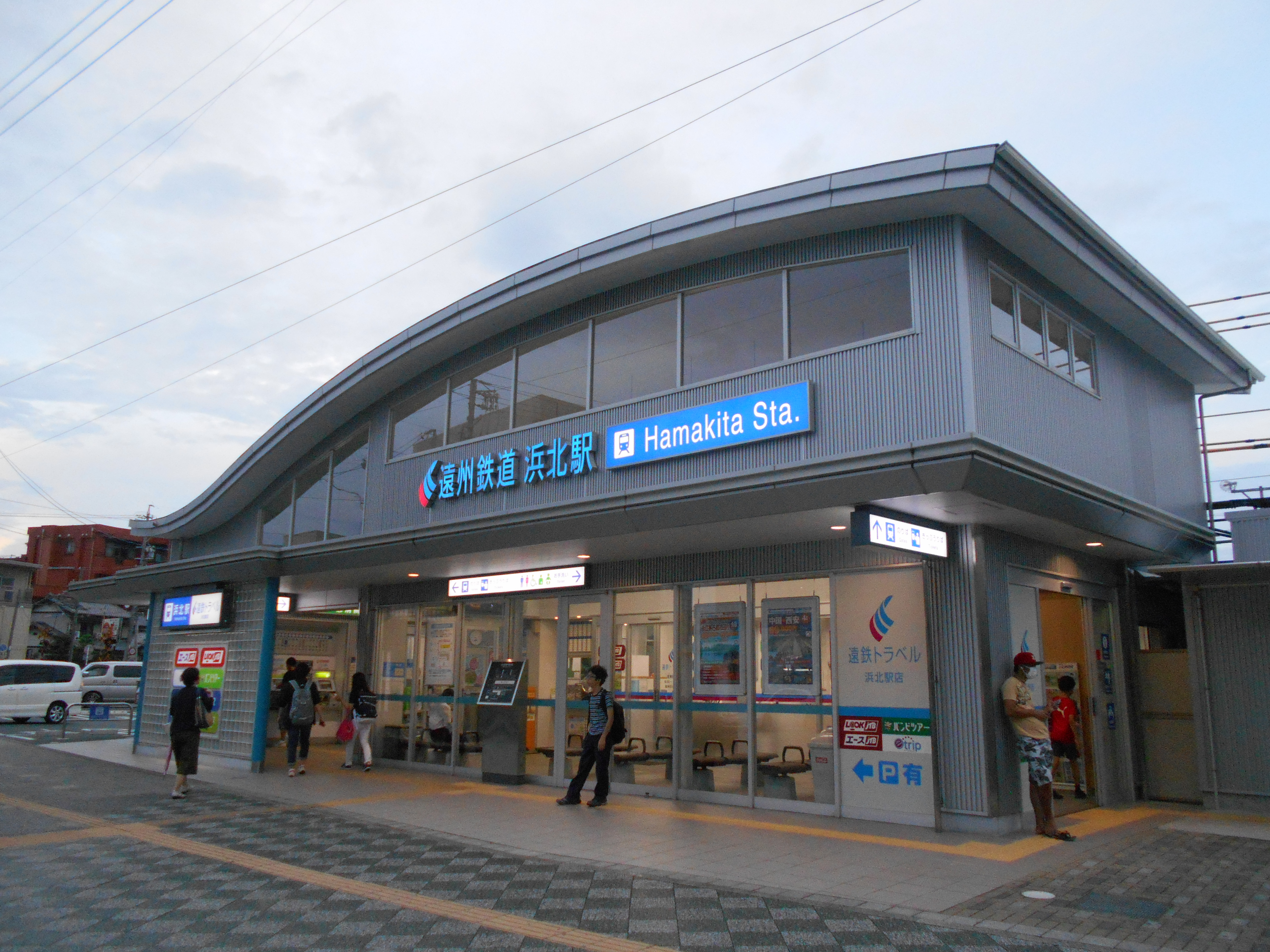 静岡県浜松市浜北区にある遠州鉄道浜北駅。